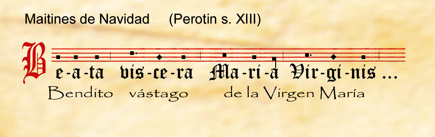 Conductus monofónico: Beata_viscera, del Maitines de Navidad; Autor: música de Perotin (ed. Thurson, pág. 124-125) y texto con estrofas de Walter de Chatillon (sXIII), Manusc. Wolfenbüttel 1099 (W2).